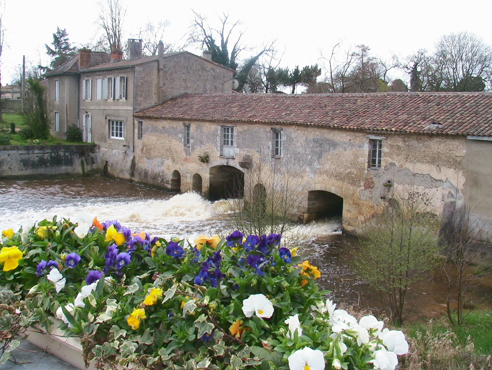 Mill of Gajac in Saint-Médard-en-Jalles, Médoc, 33, France